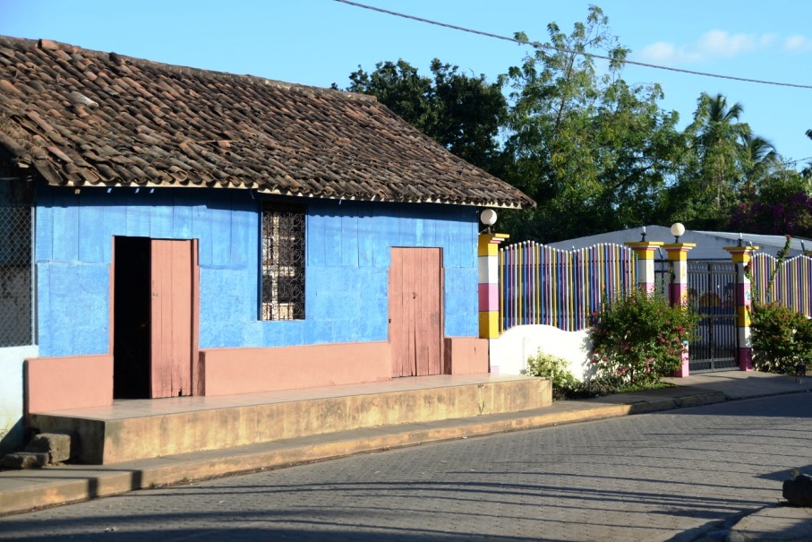 Una casa azul en la 1a avenida en Tisma